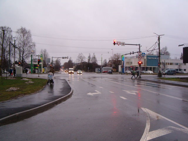 Linnu tee.